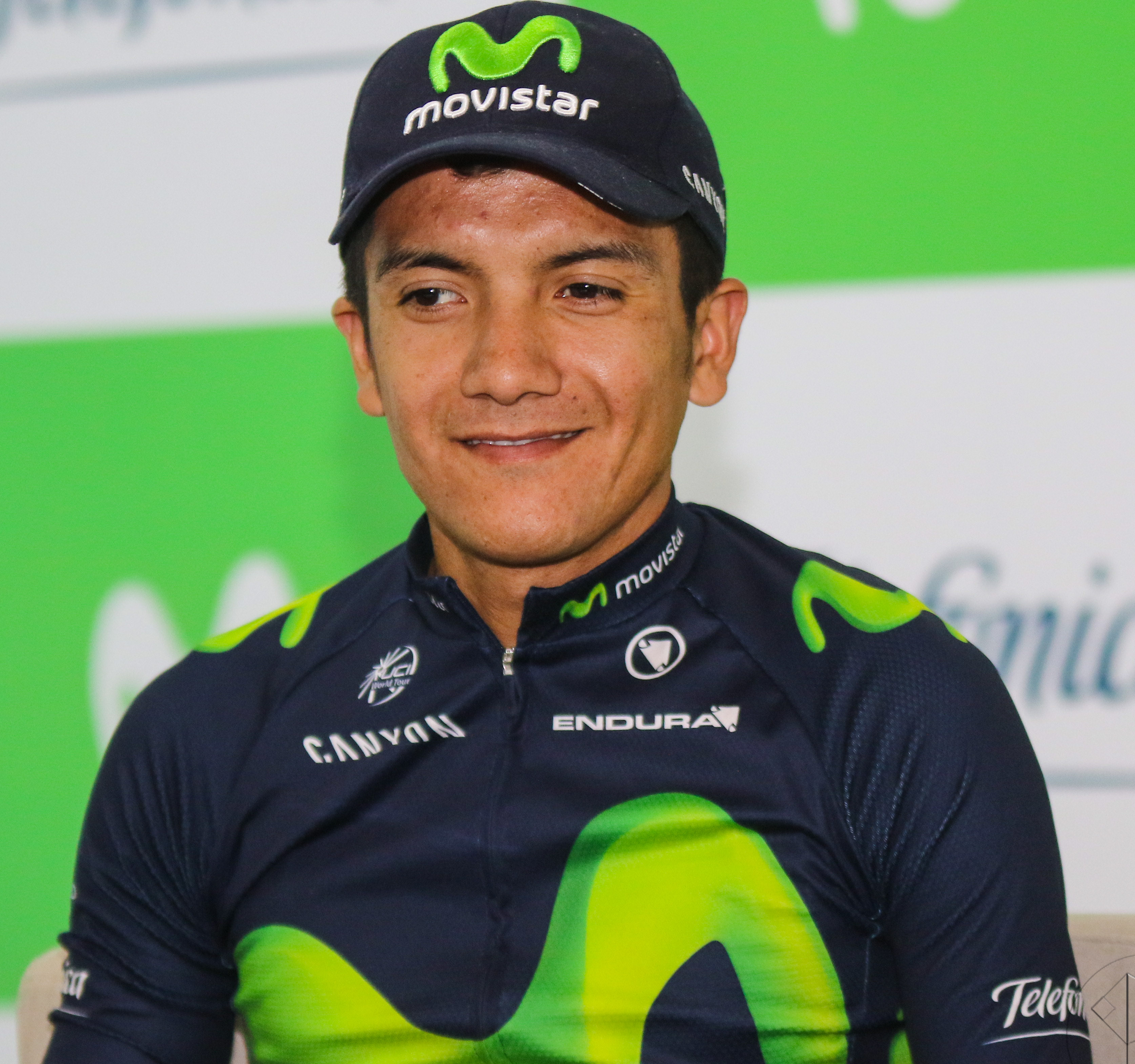 Richard Carapaz en 2017